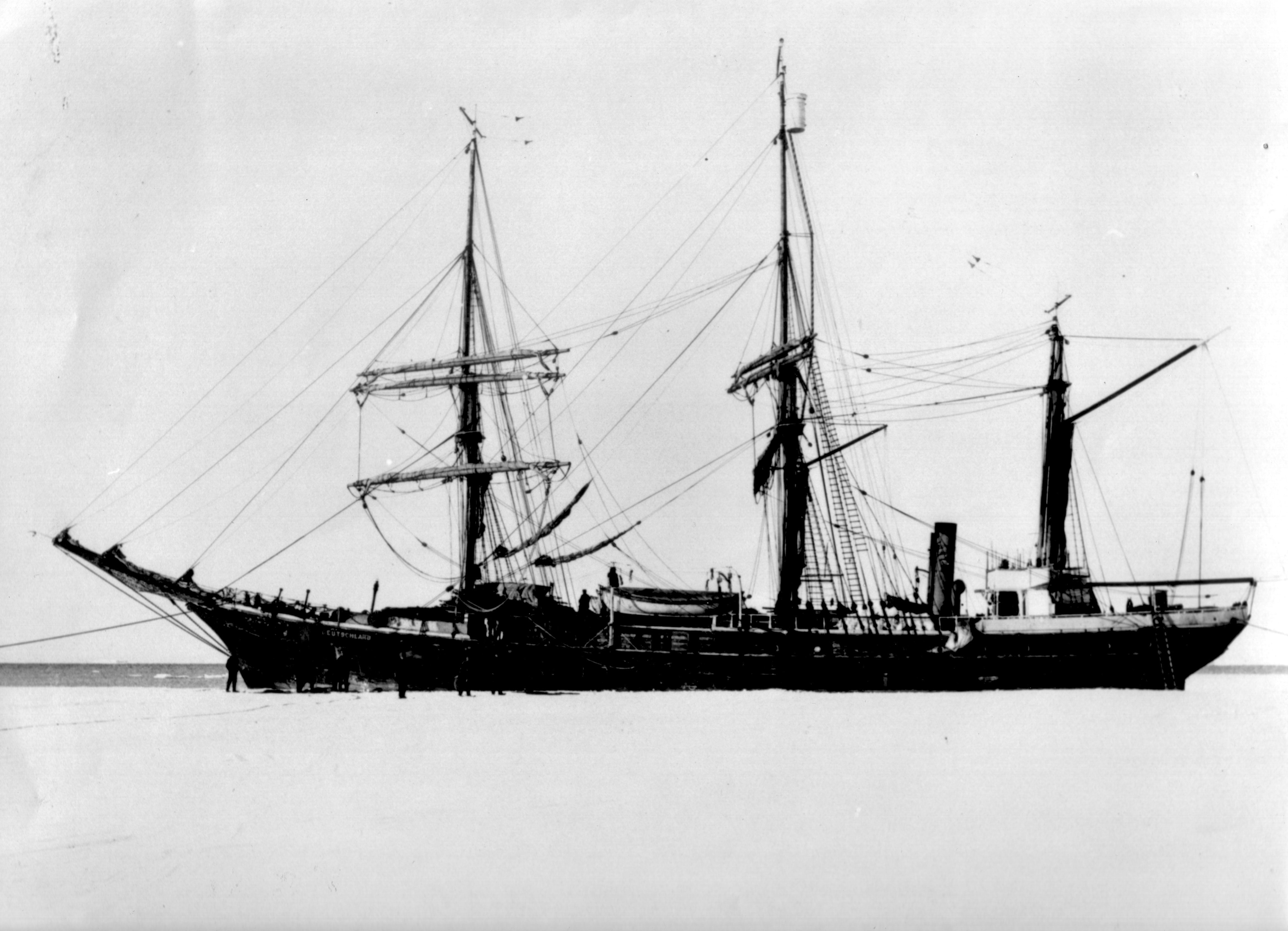 Экспедиционное судно "Дойчланд"